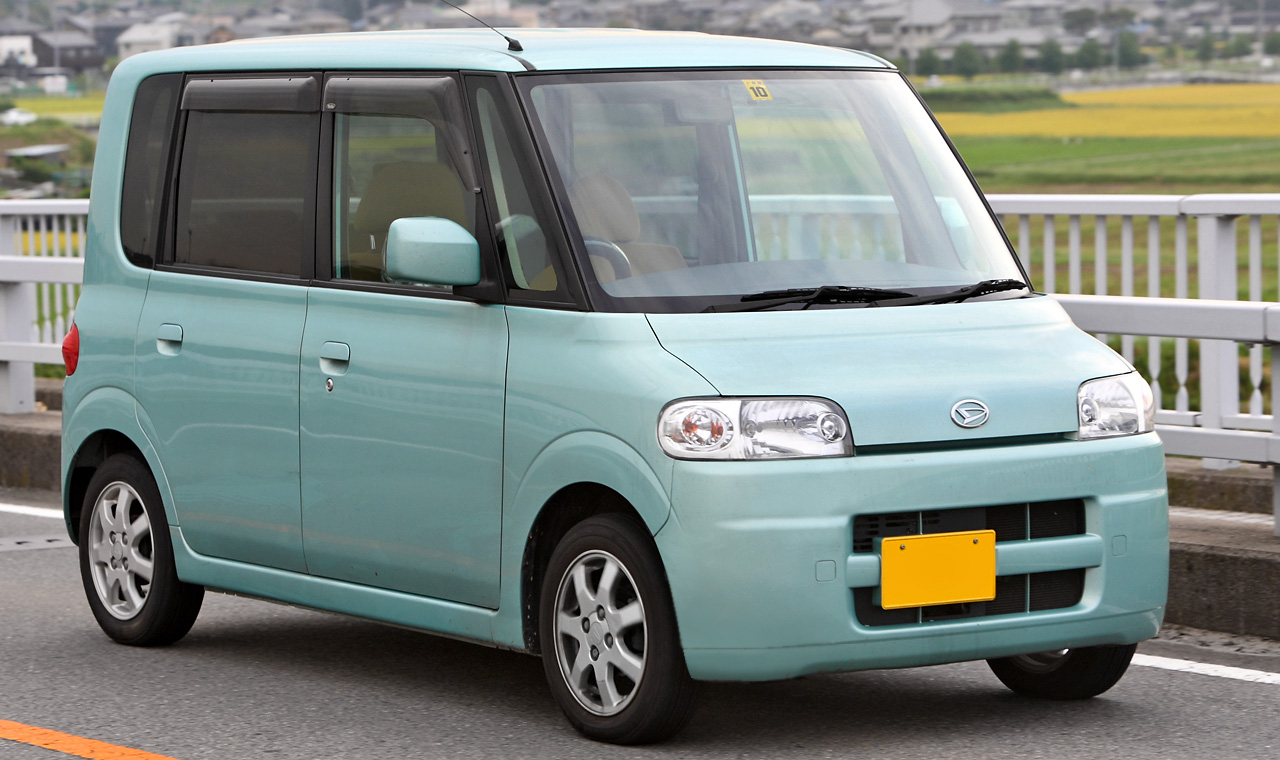 Daihatsu Tanto X (L350S, 2003/11 - 2005/06)